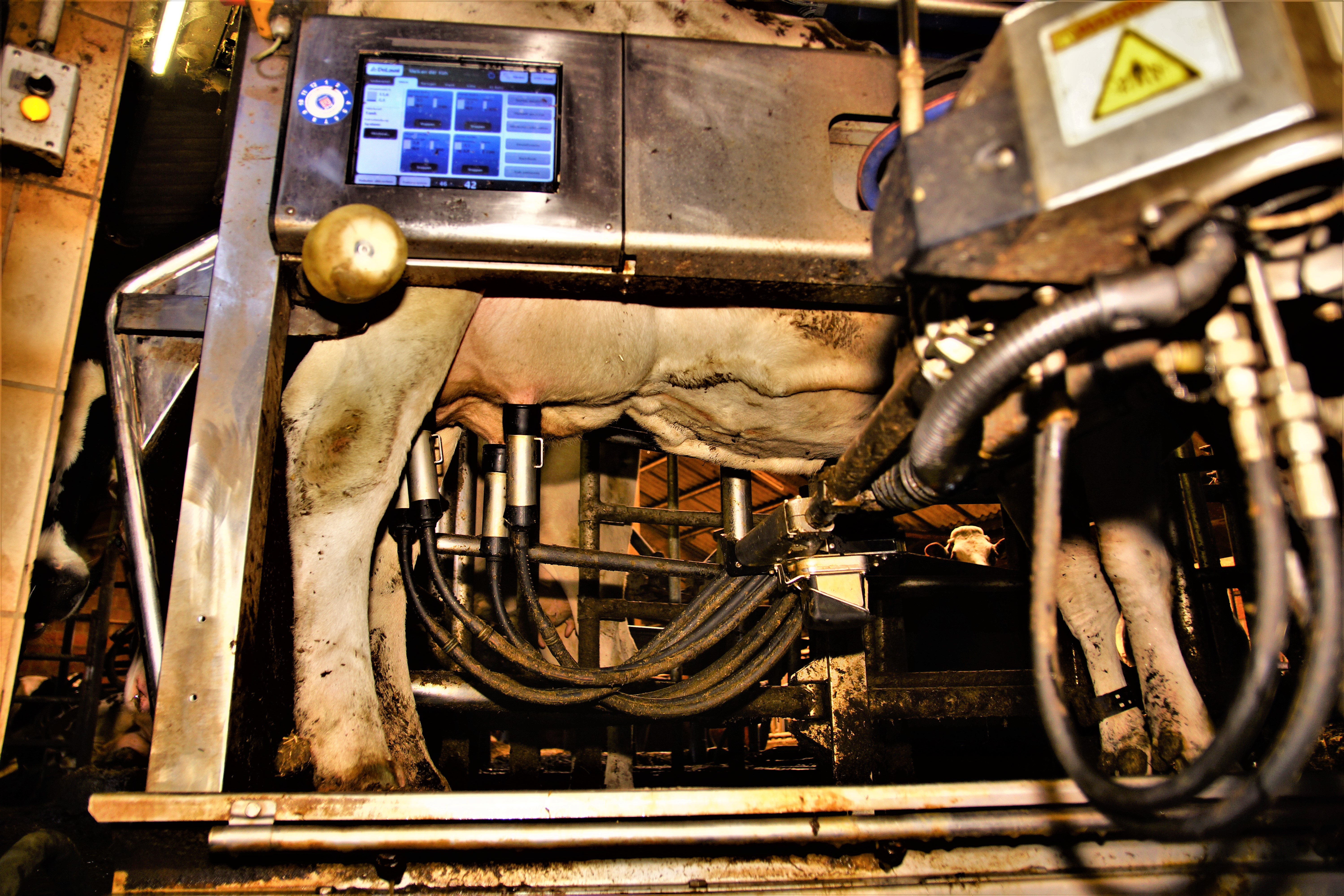 De Laval Melkroboter während des Melkens